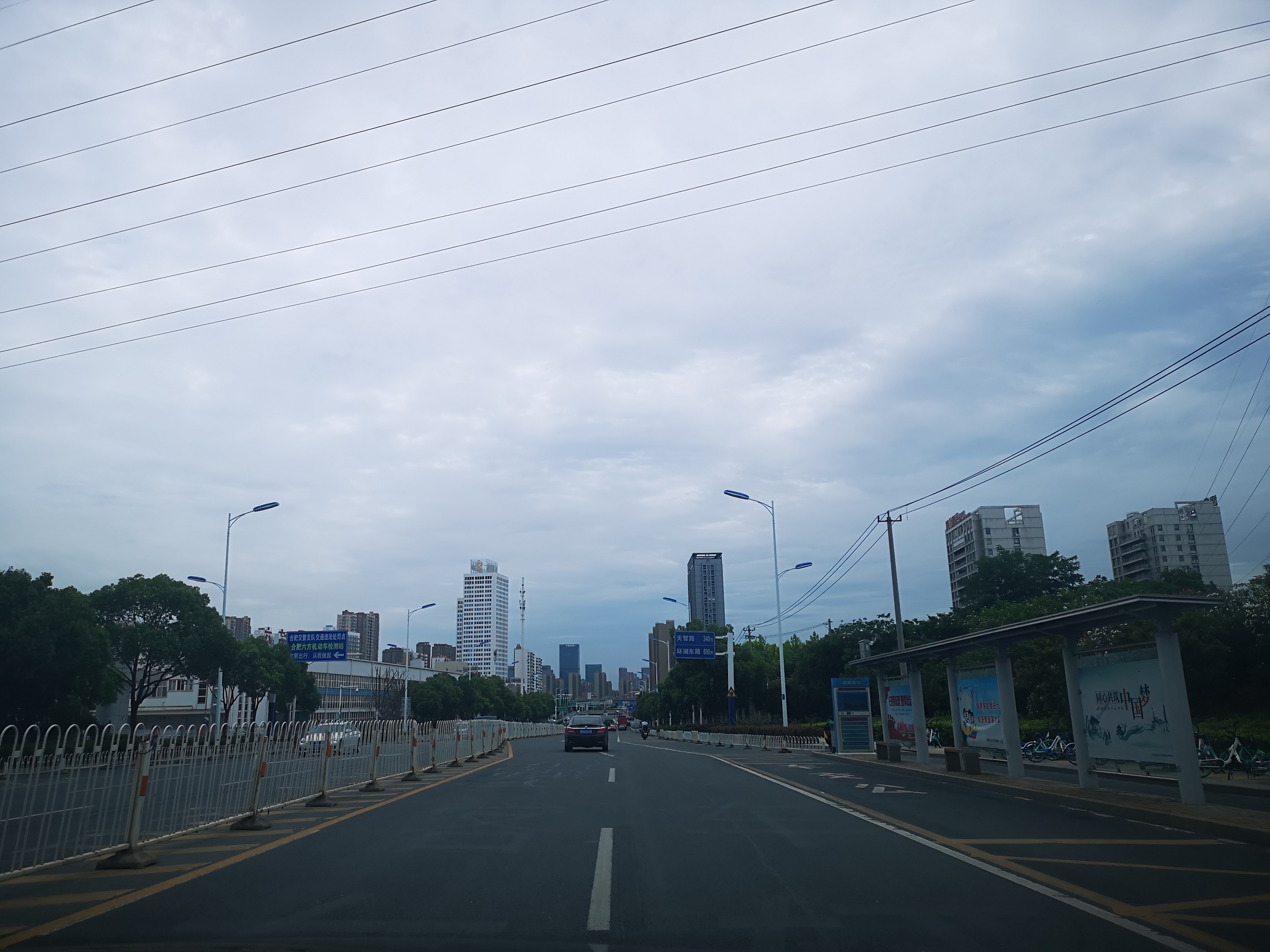 中文（中国大陆）: 合肥市望江西路